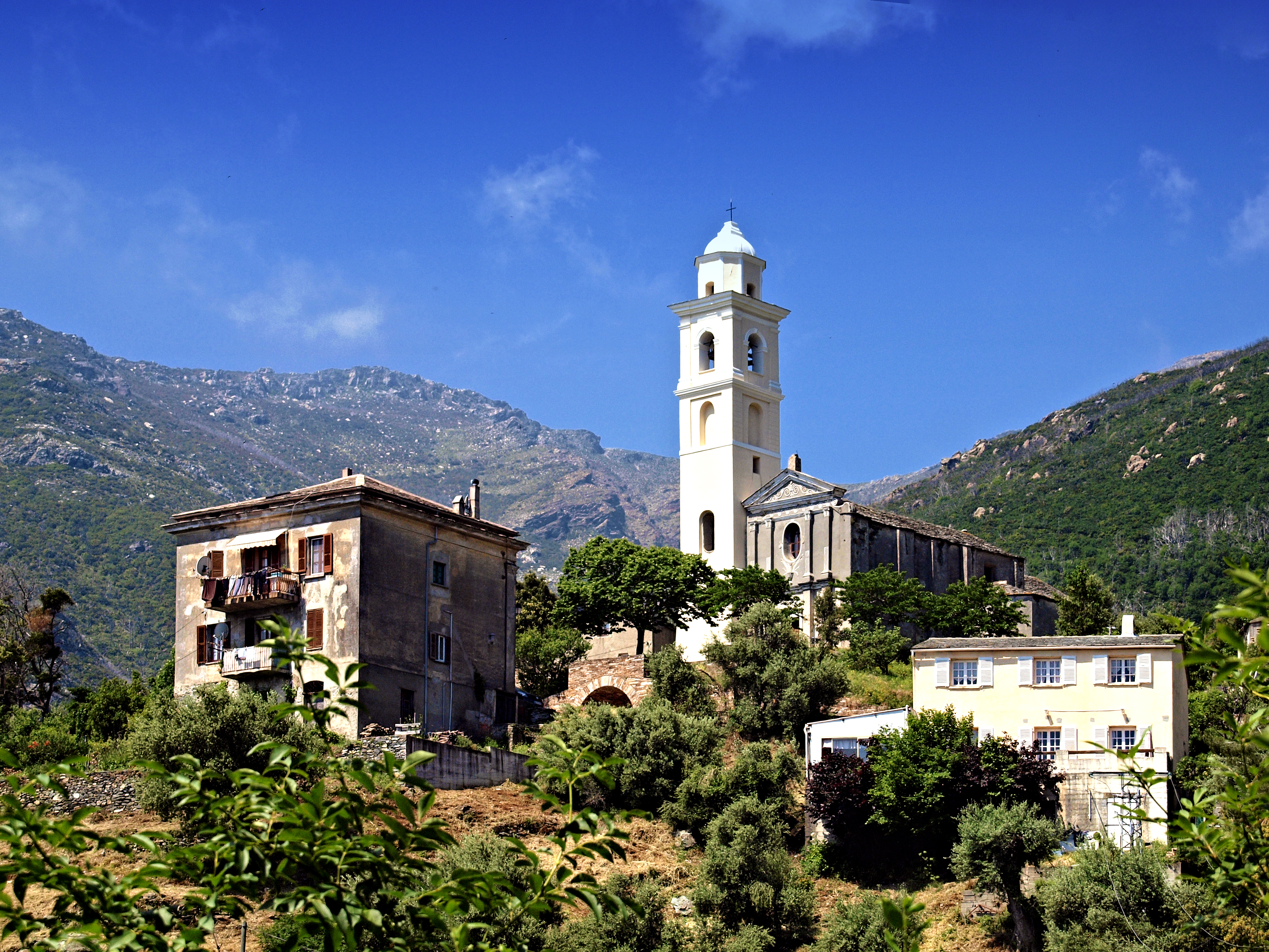 Santa-Maria-di-Lota (Corsica) - Église Santa-Maria Assunta au hameau de Mandriale